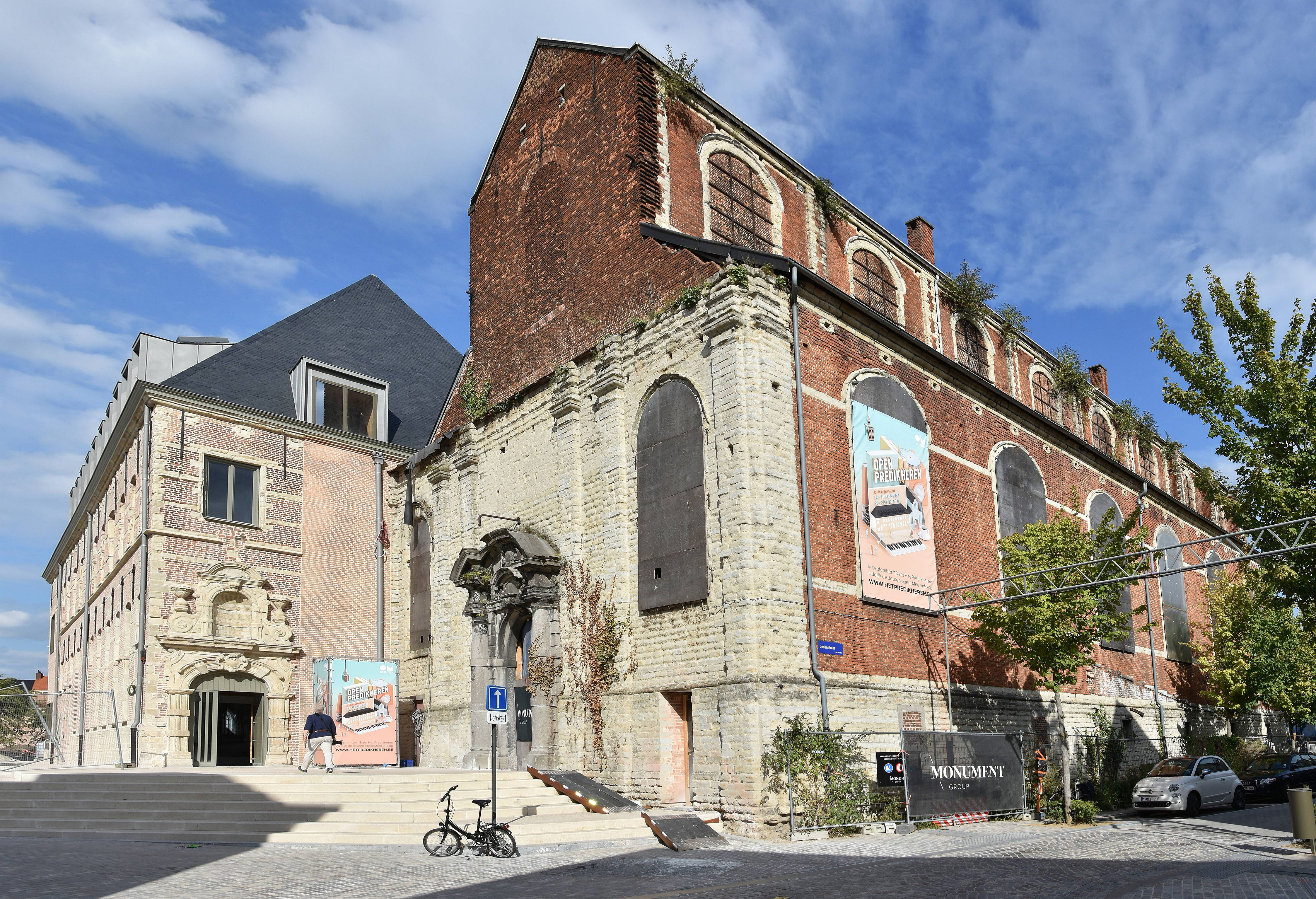 Het Predikheren - Mechelen 13-09-2018 This photo of immovable heritage has been taken in the Flemish Region